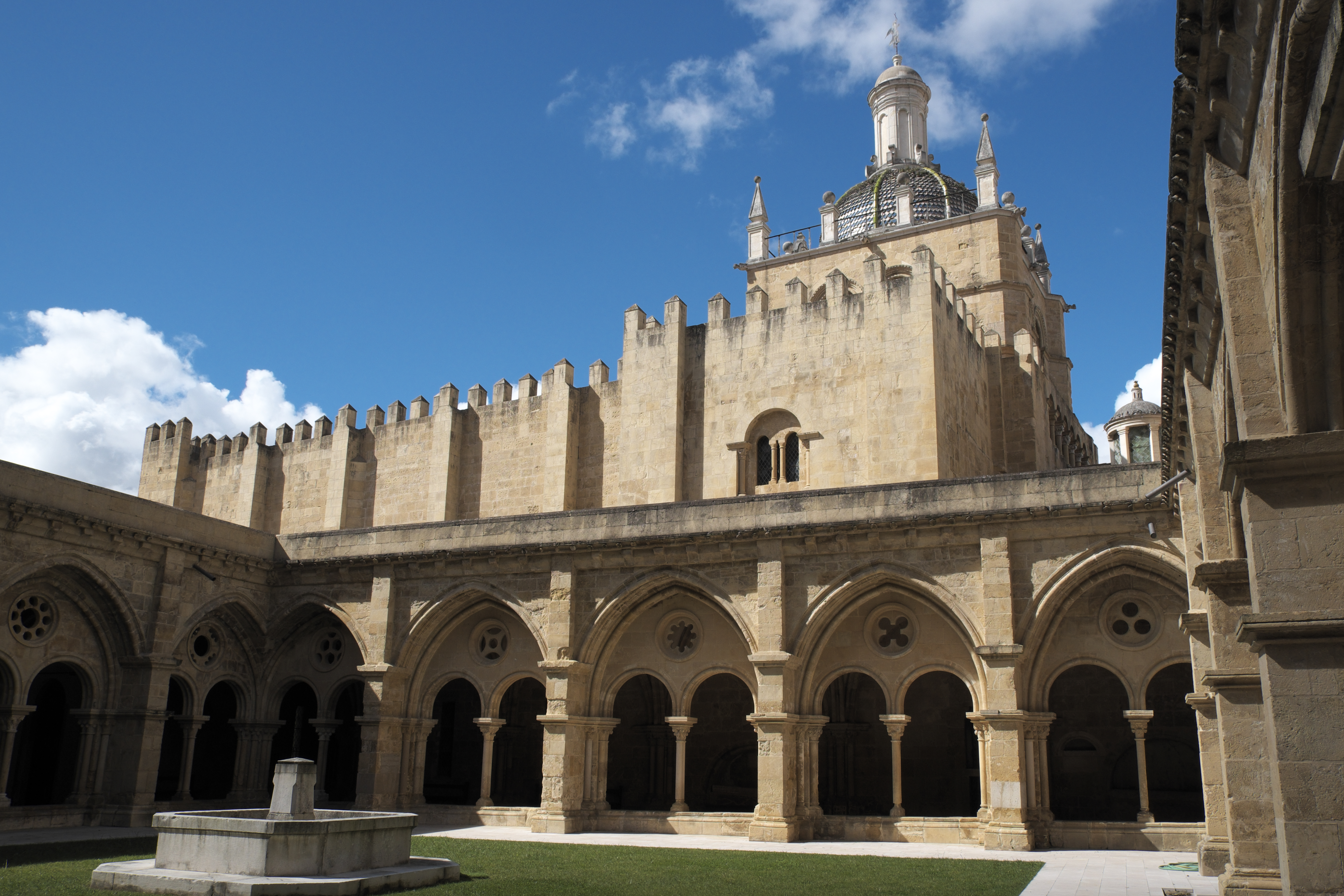 Frühgotischer Kreuzgang der alten Kathedrale Sé Velha in Coimbra in Portugal, aus dem frühen 13. Jahrhundert, Blick auf Sé Velha